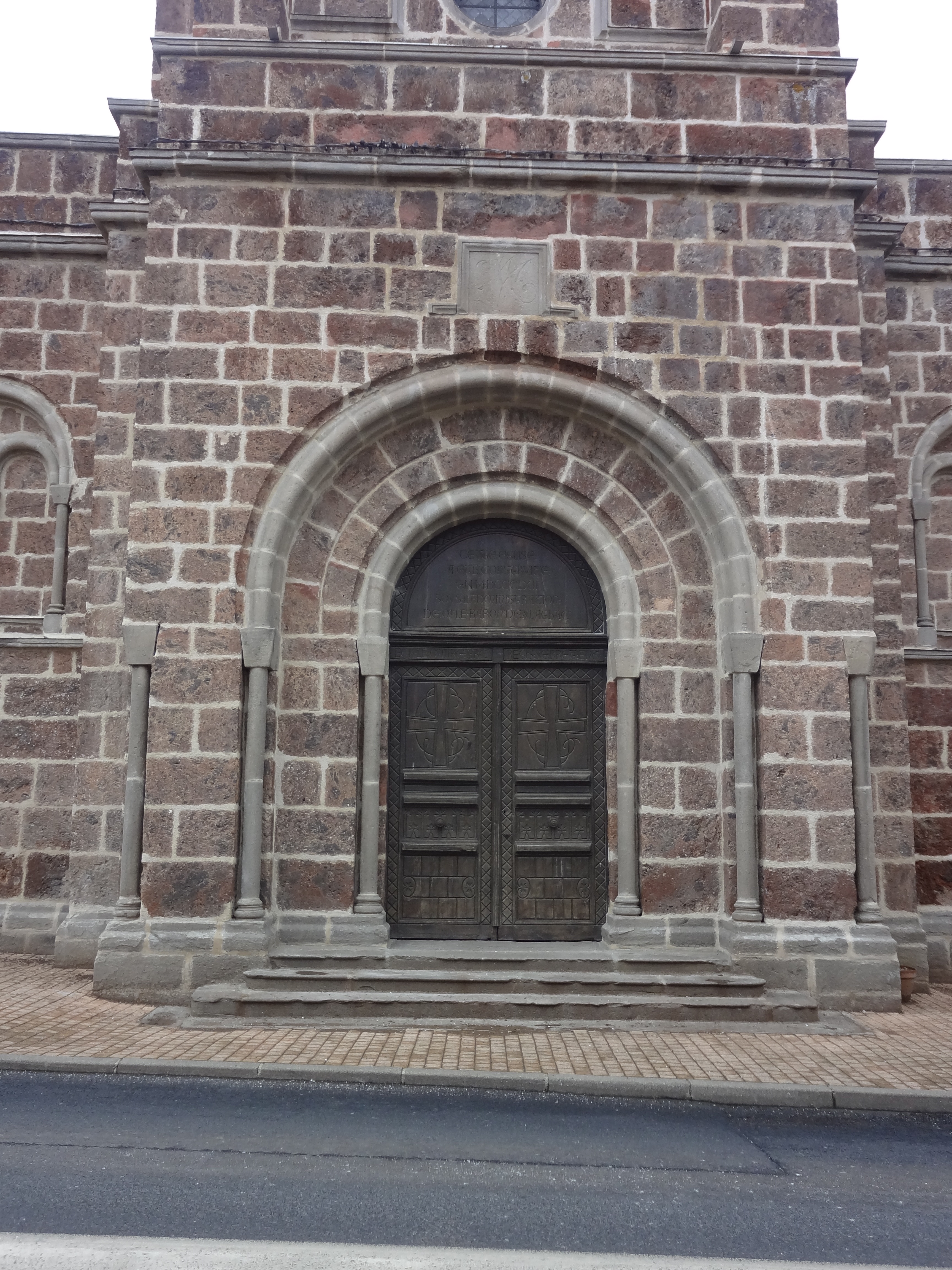 Portail ornant la façade principale de l'église Saint-Georges de Saint-Georges-d'Aurac (43).